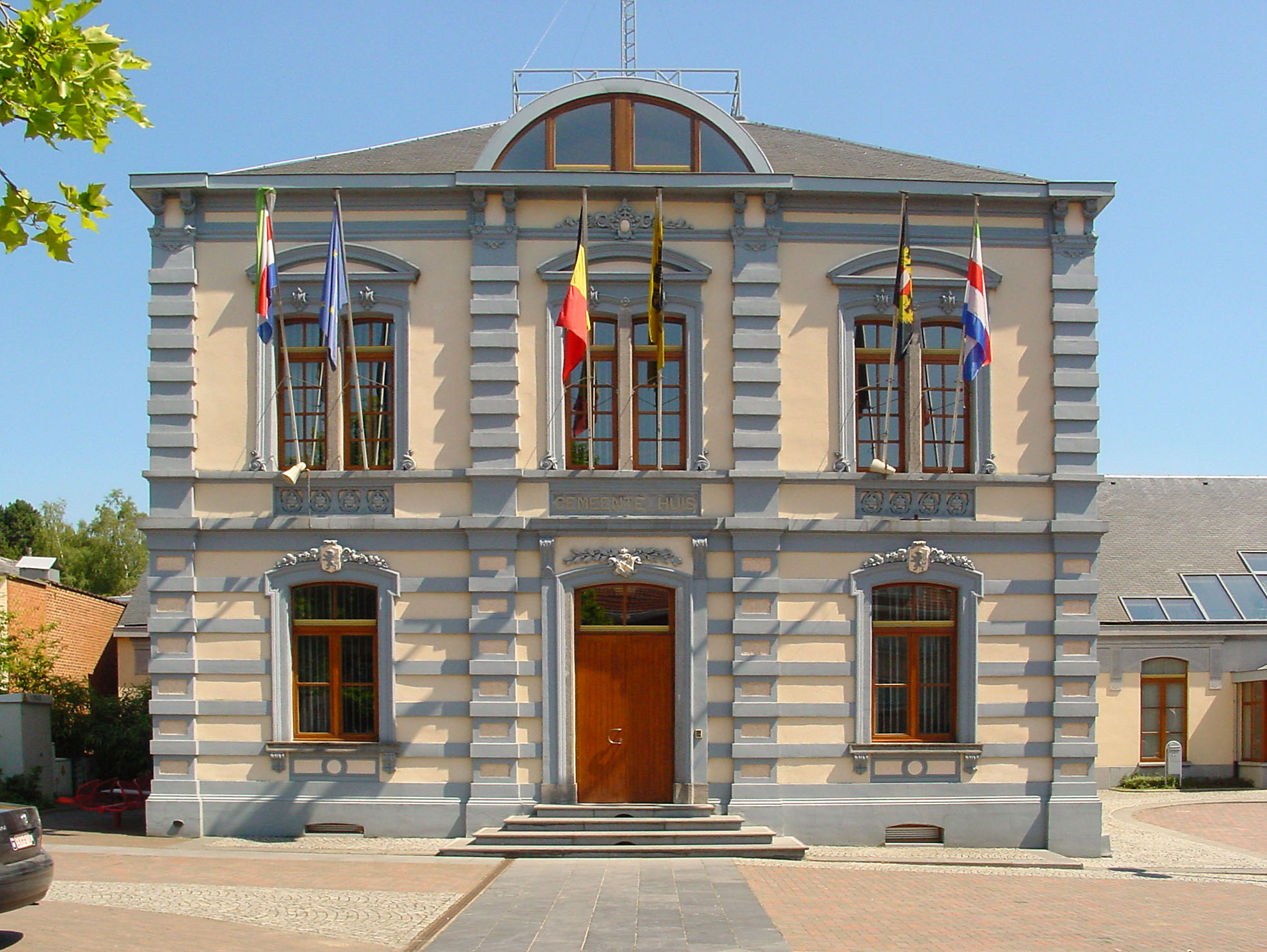 Gemeentehuis van Huldenberg (foto Wouter Hagens)